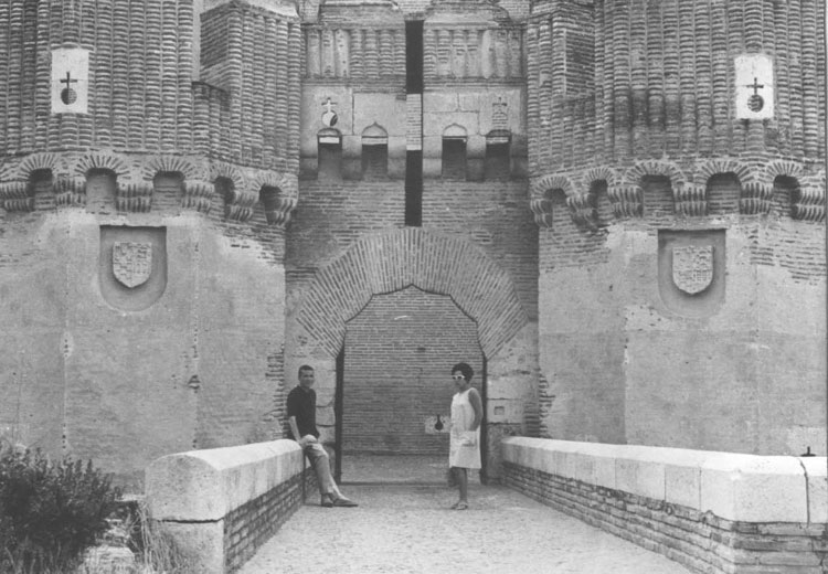 Coca (Segovia) - Coca (Segovia) - Fotografía B/N